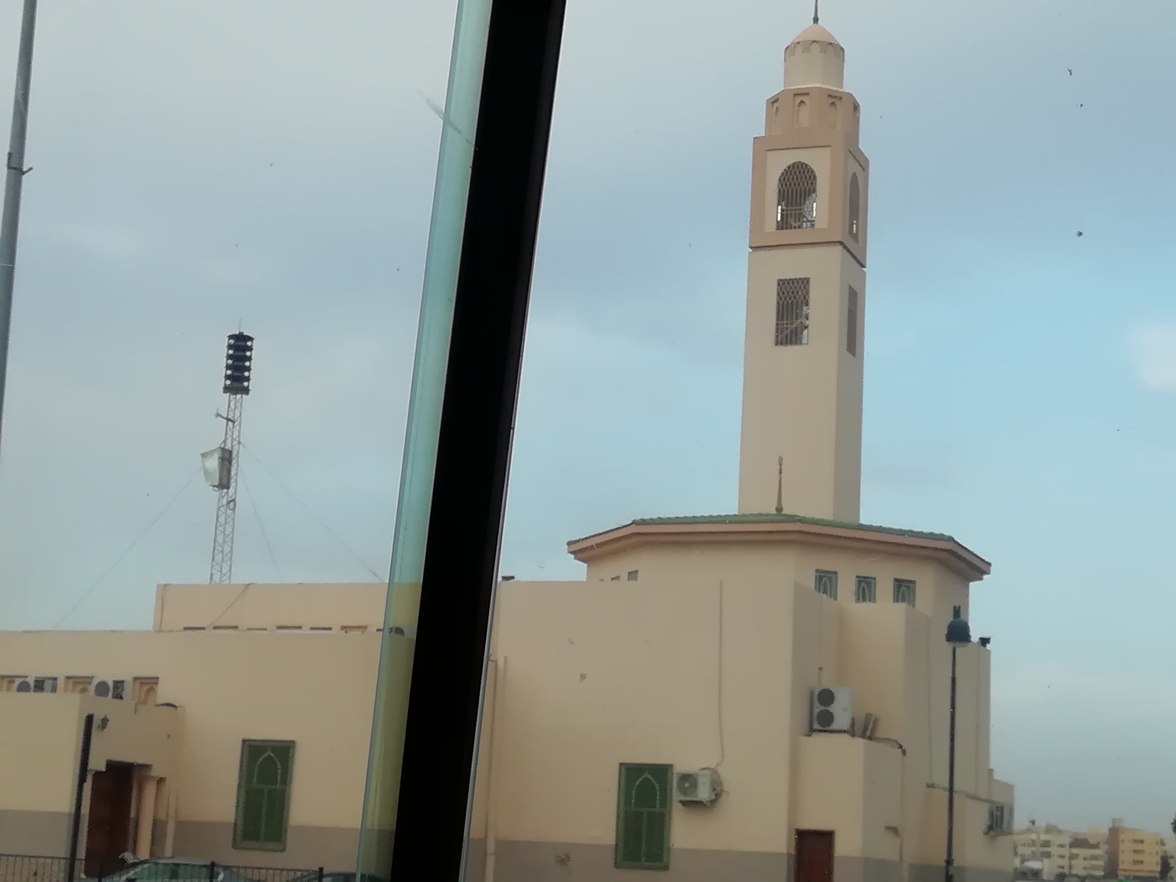 al-Madinah al-Munawarah Ijaba mosque (Bani Muawia mosque)